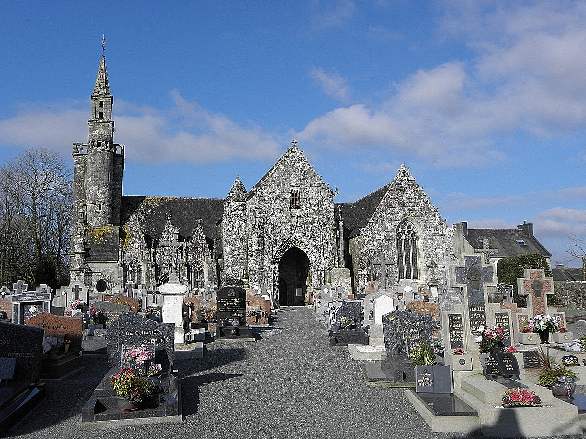 Flanc méridional de l'église N.D. de Plourac'h (22)